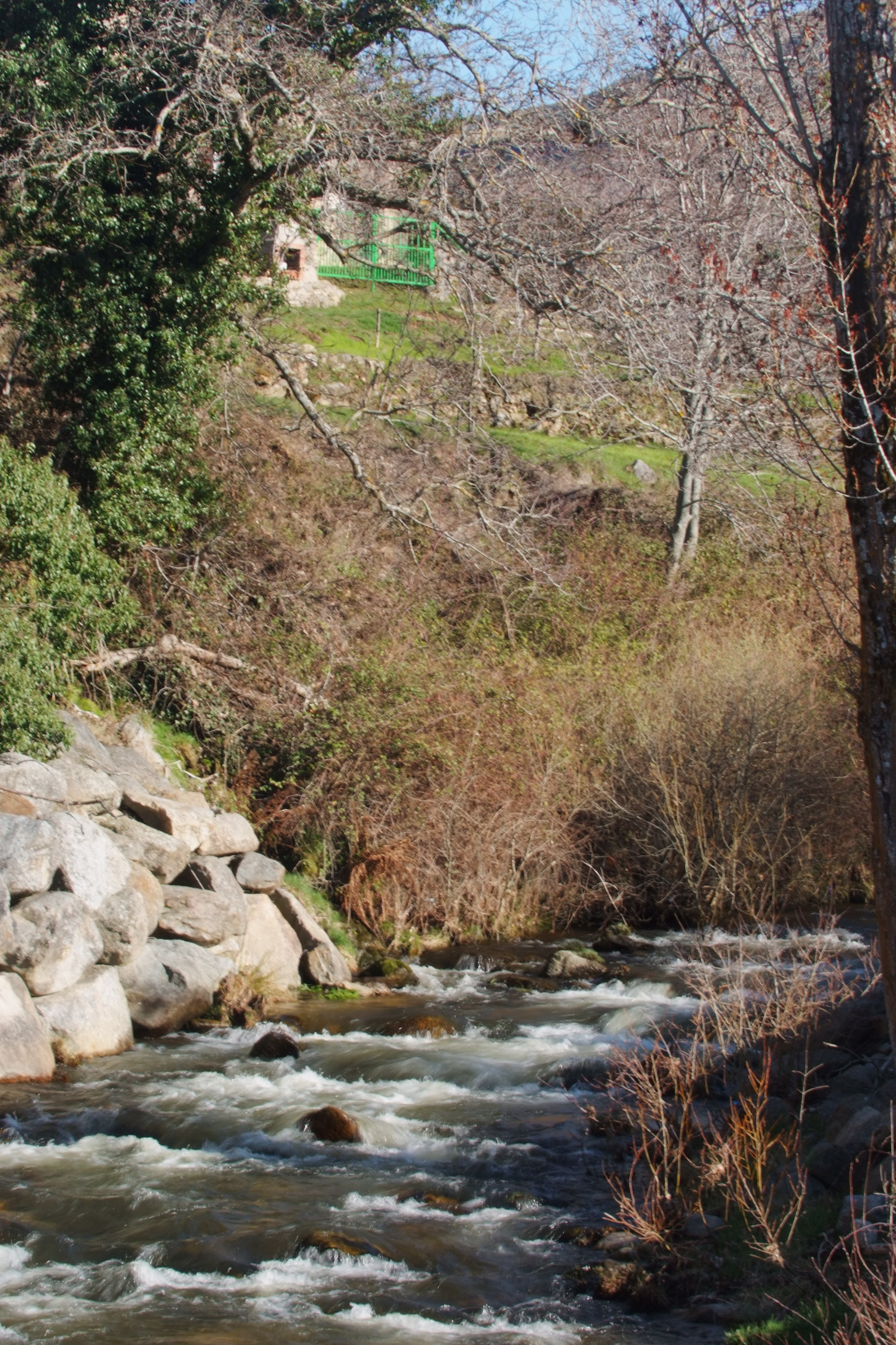 Curso medio del río Corneja a su paso por La Ribera (Ávila; España)